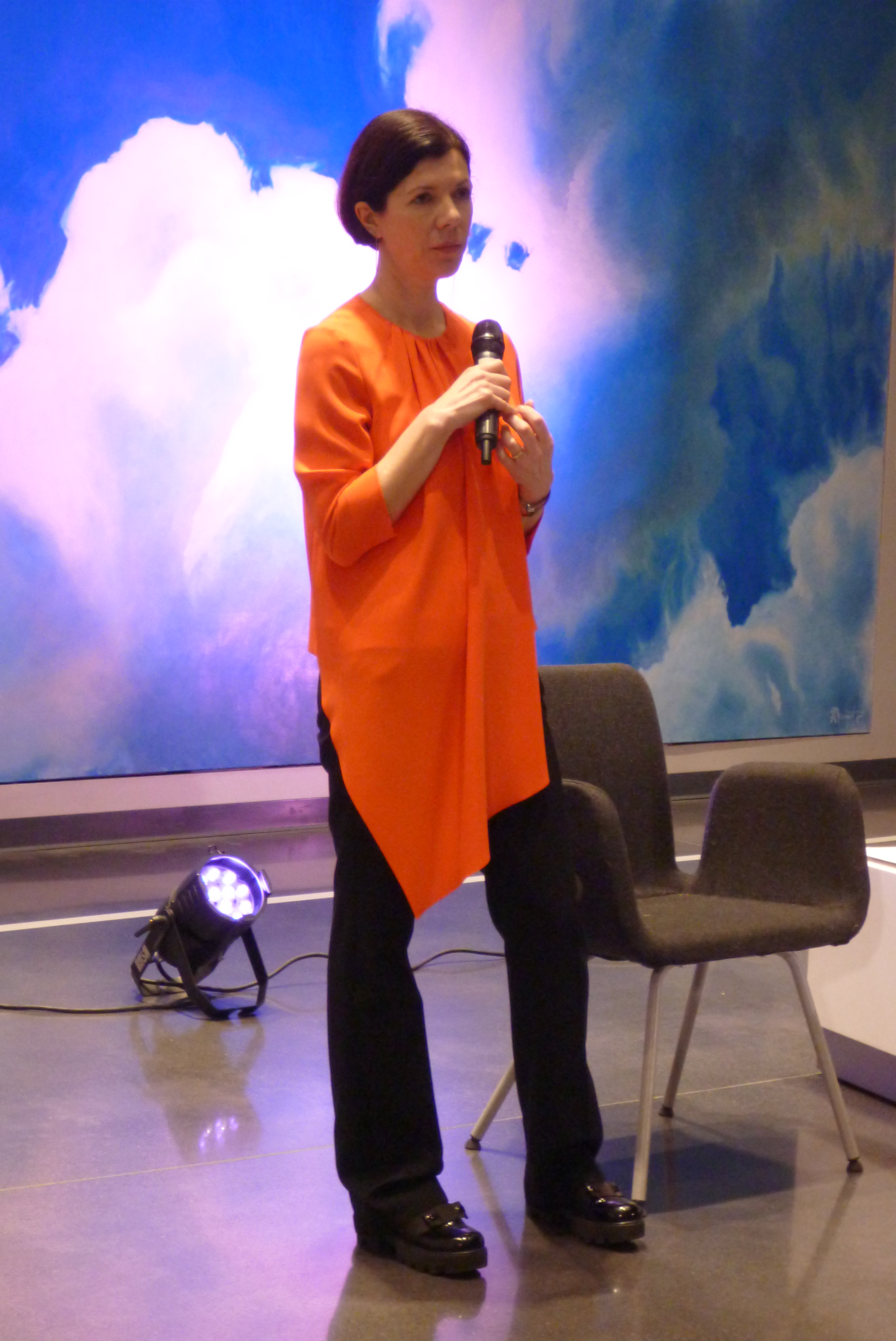 Анна Матвеева в Ельцин-центре 19 февраля 2019 года